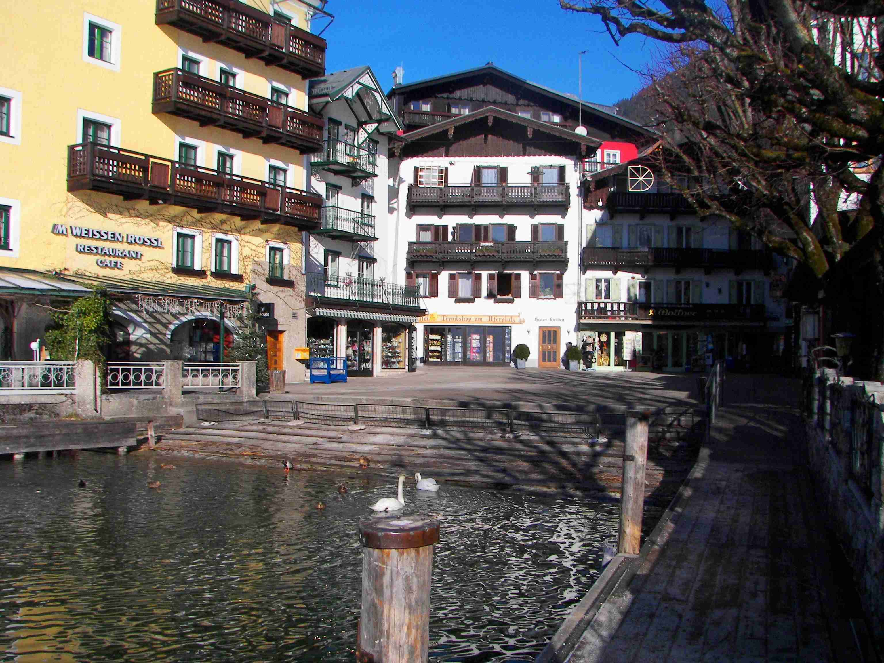 St. Wolfgang, Café Im weissen Rössl und Dorfplatz